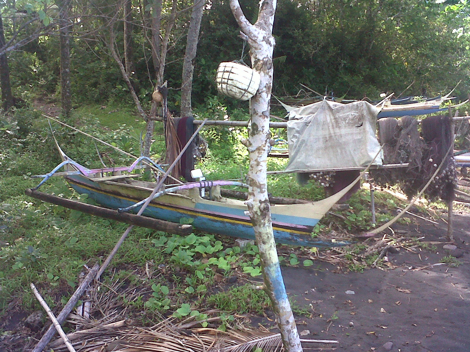 Perahu tradisional Suku sangihe "Bininta" muai digunakan sebelum bangsa Eropa masuk di kepulaun Sangihe tahun 1400